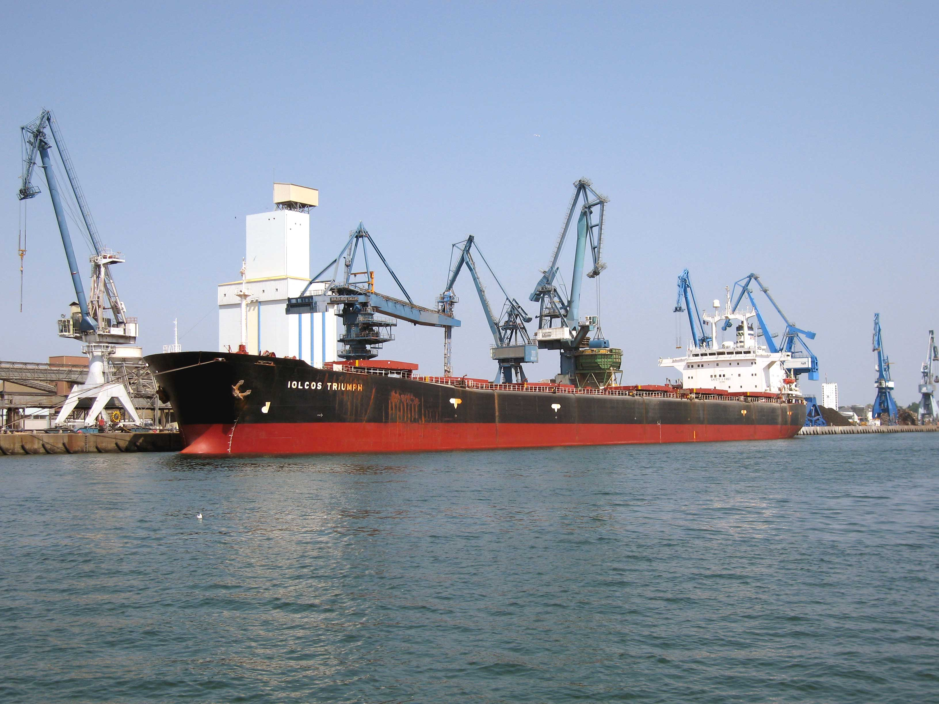 Vraquier Iolcos Triumph ex Saikai Maru dans le port de commerce de Lorient débarque du tourteau de soja en provenance du Brésil. Lorient, France